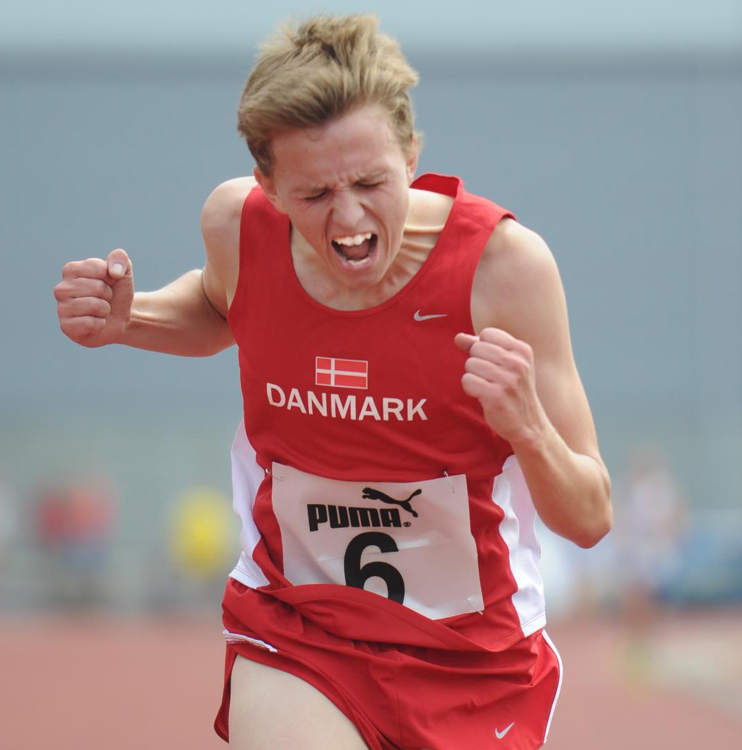 Jakob Dybdal Abrahamsen ved NM i Finland hvor han vinder historisk dobbelt guld.